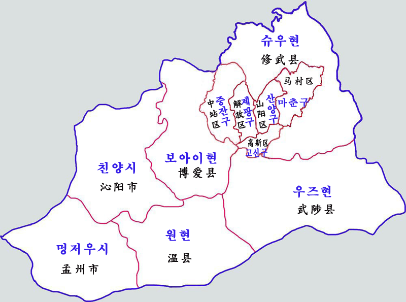 자오쭤시 현급행정구역